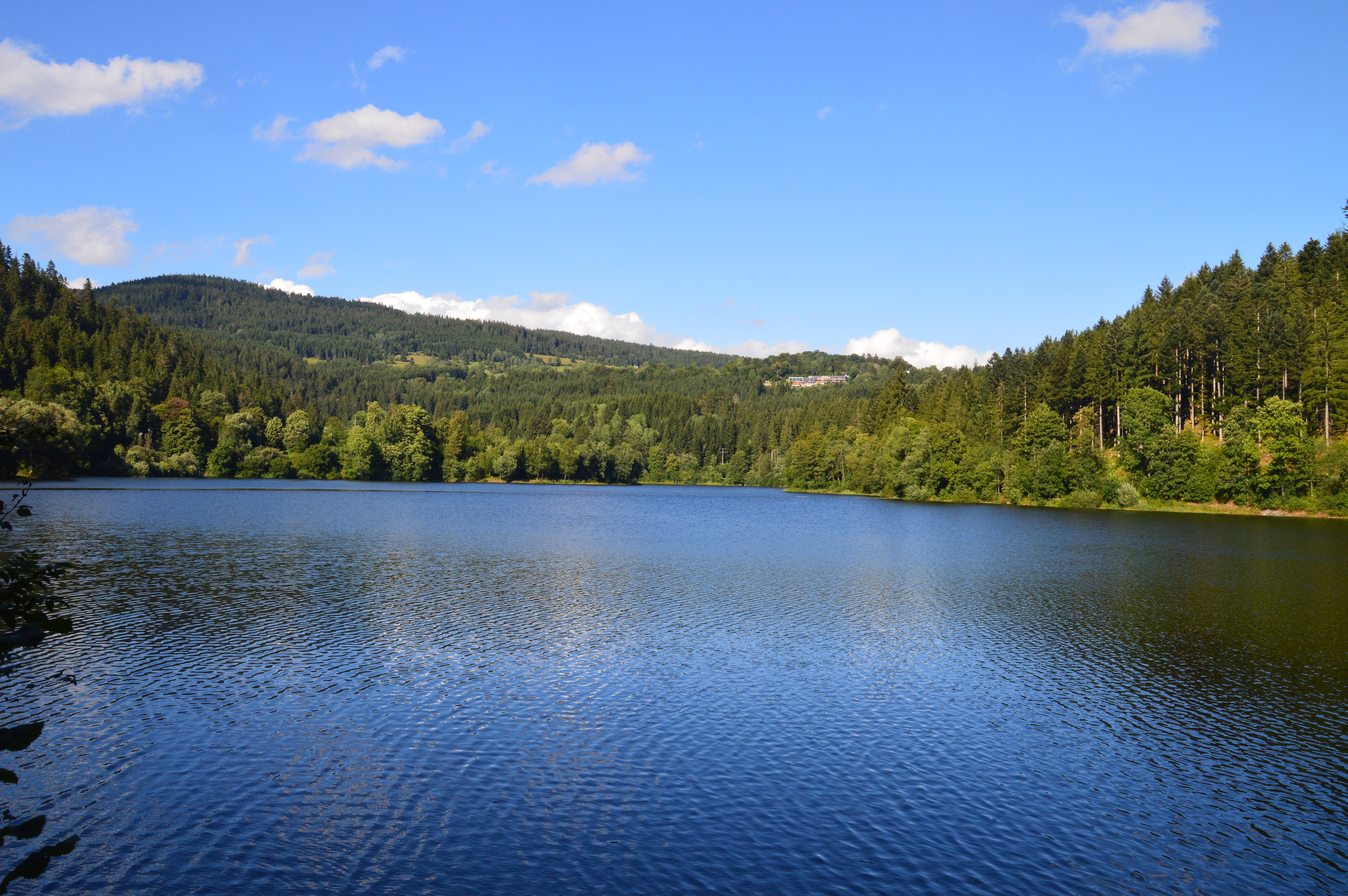 Albbeggi vo rächts neb dè Staumuèr obsi. Uffgnoo am 12. Auguscht 2013.